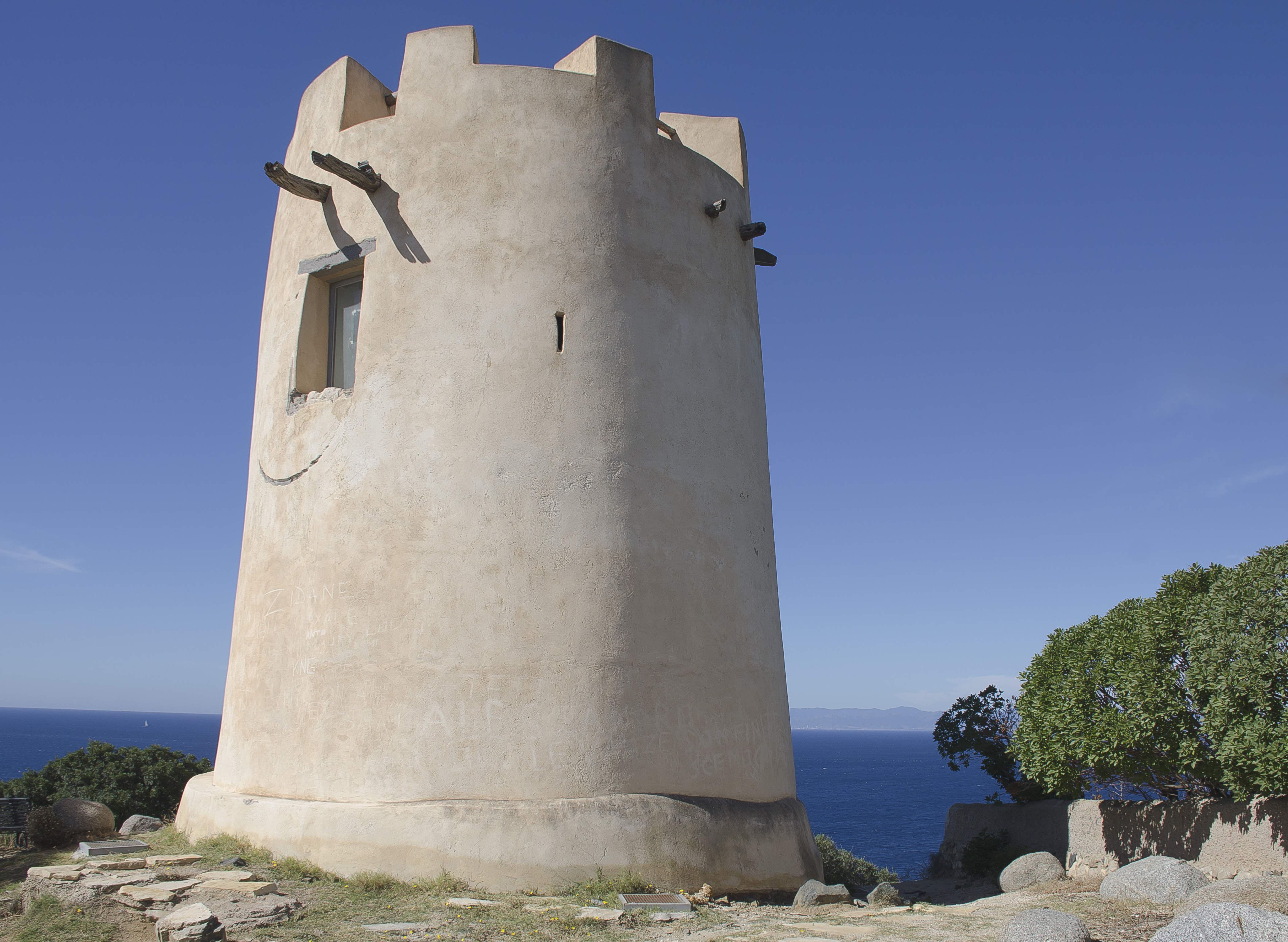 Torre de Su Fenugu, Sardinien